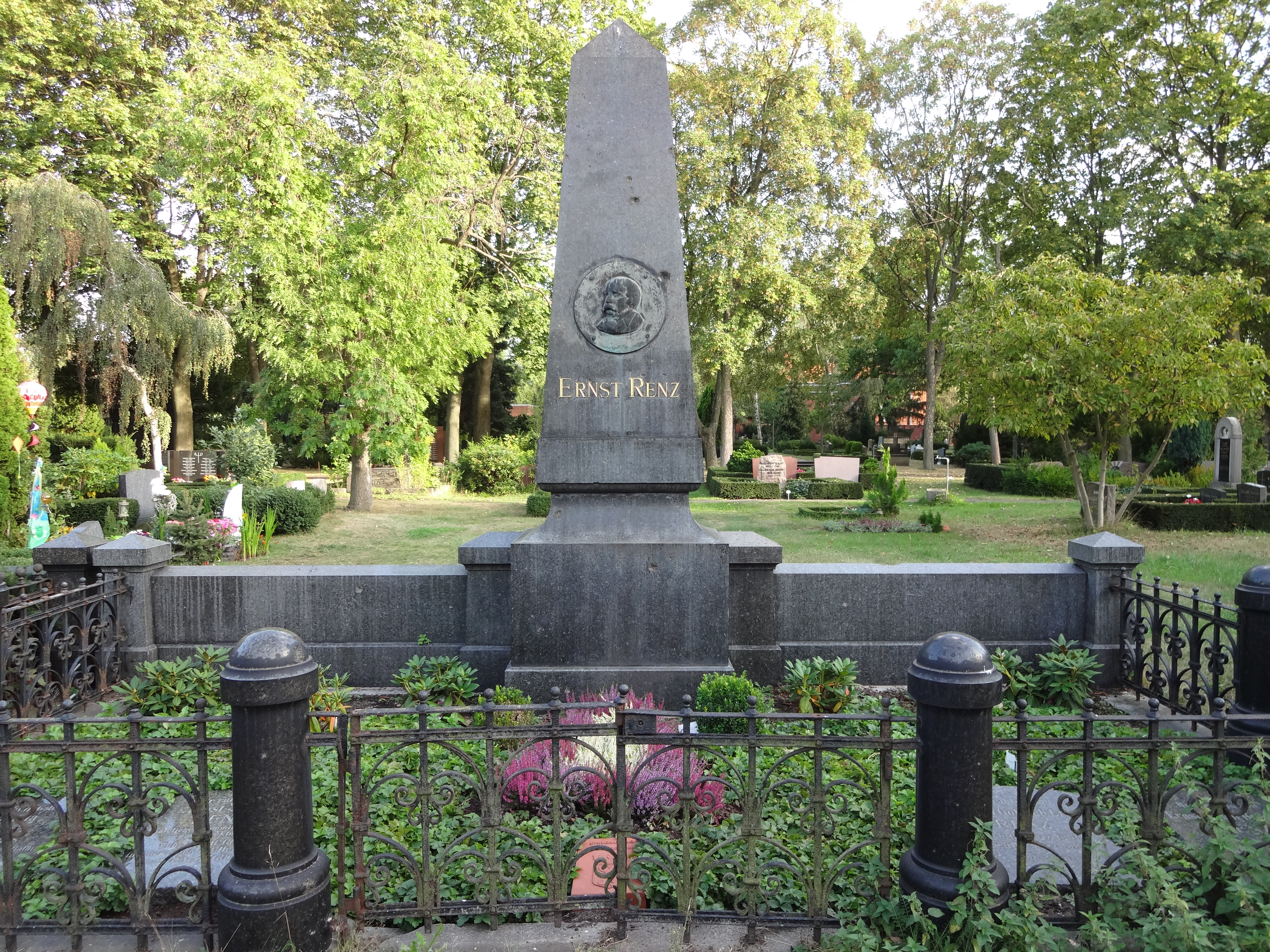 Grab von Ernst Renz auf dem Dorotheenstädtischen Friedhof II in der Liesenstraße in Berlin-Gesundbrunnen; Ehrengrab